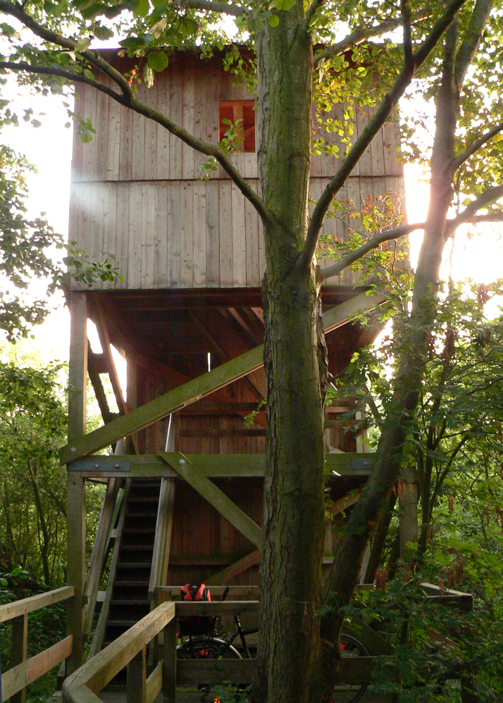 Beobachtungsturm am Steinhuder Meer